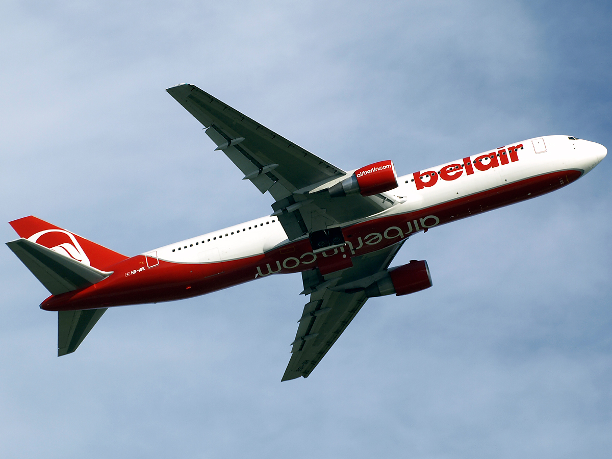 Boeing 767 der Belair in modifizierten Air Berlin-Farben